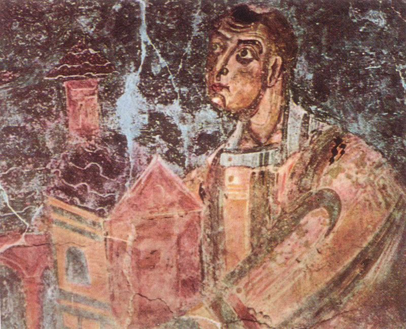 Galliano - Cantù Ariberto da Intimiano offerente il modello della chiesa (Abside della Basilica di San Vincenzo)